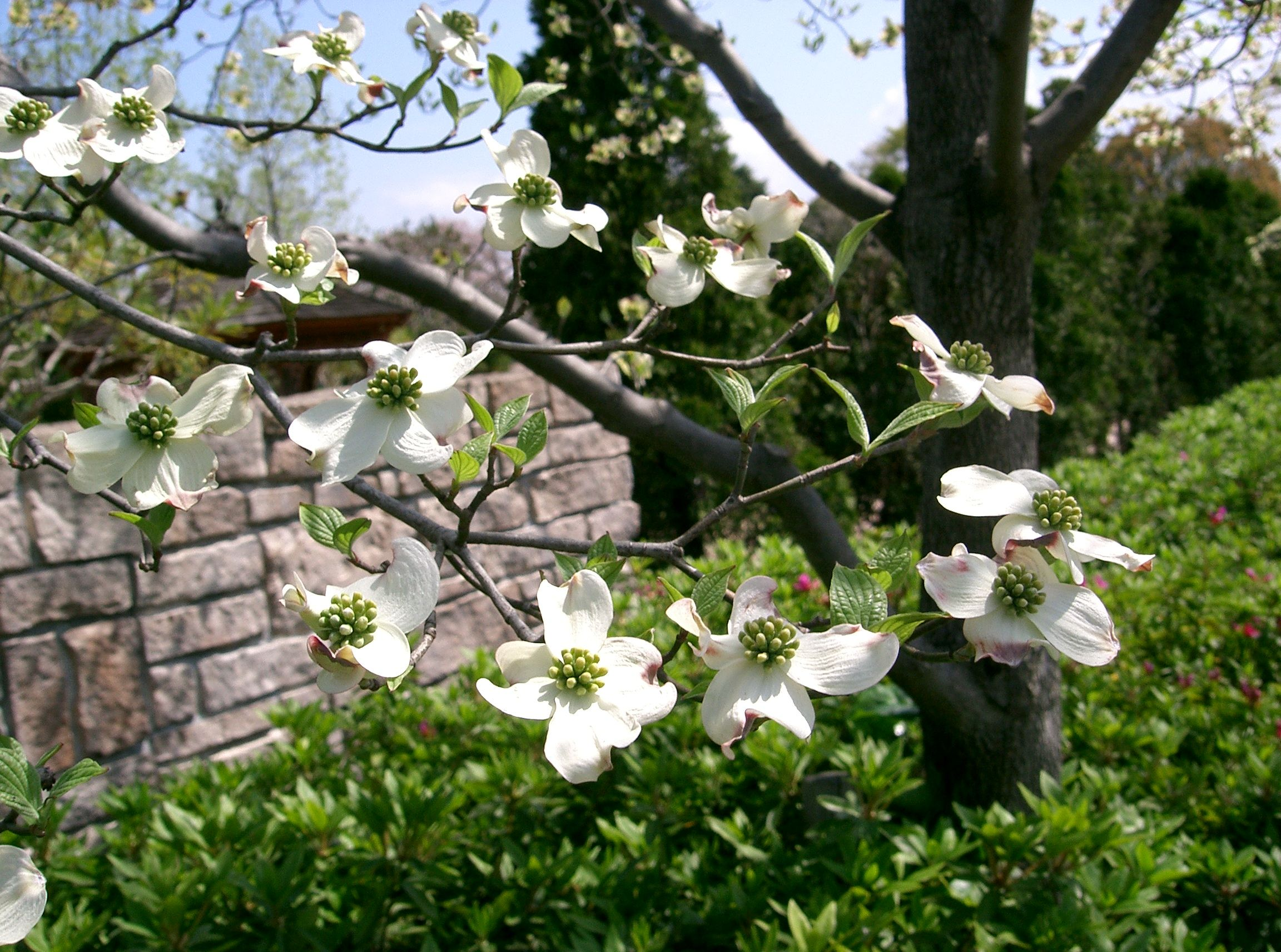 Benthamidia florida